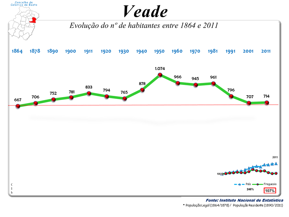 Censos 1864/2011